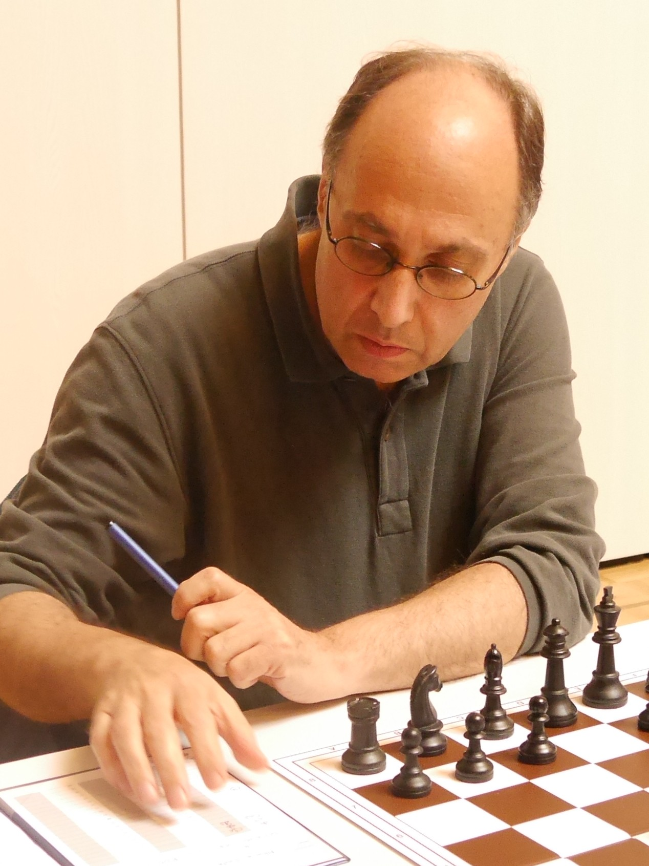 Daniel Roos, Schachländerkampf Baden-Elsass 2016 in Freiburg-Zähringen.